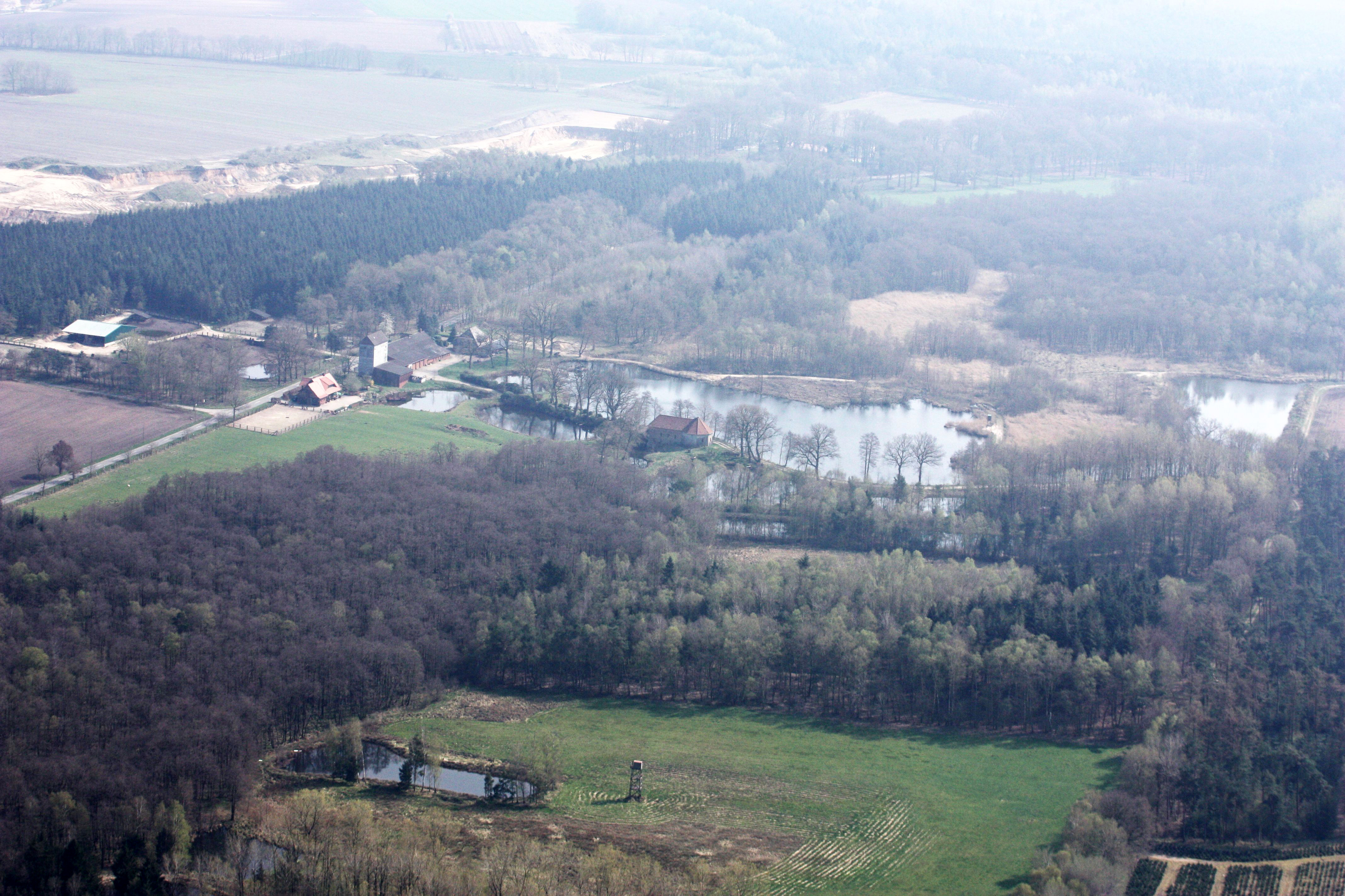 Landschaft in der Nähe des Autobahndreiecks Ahlhorner Heide